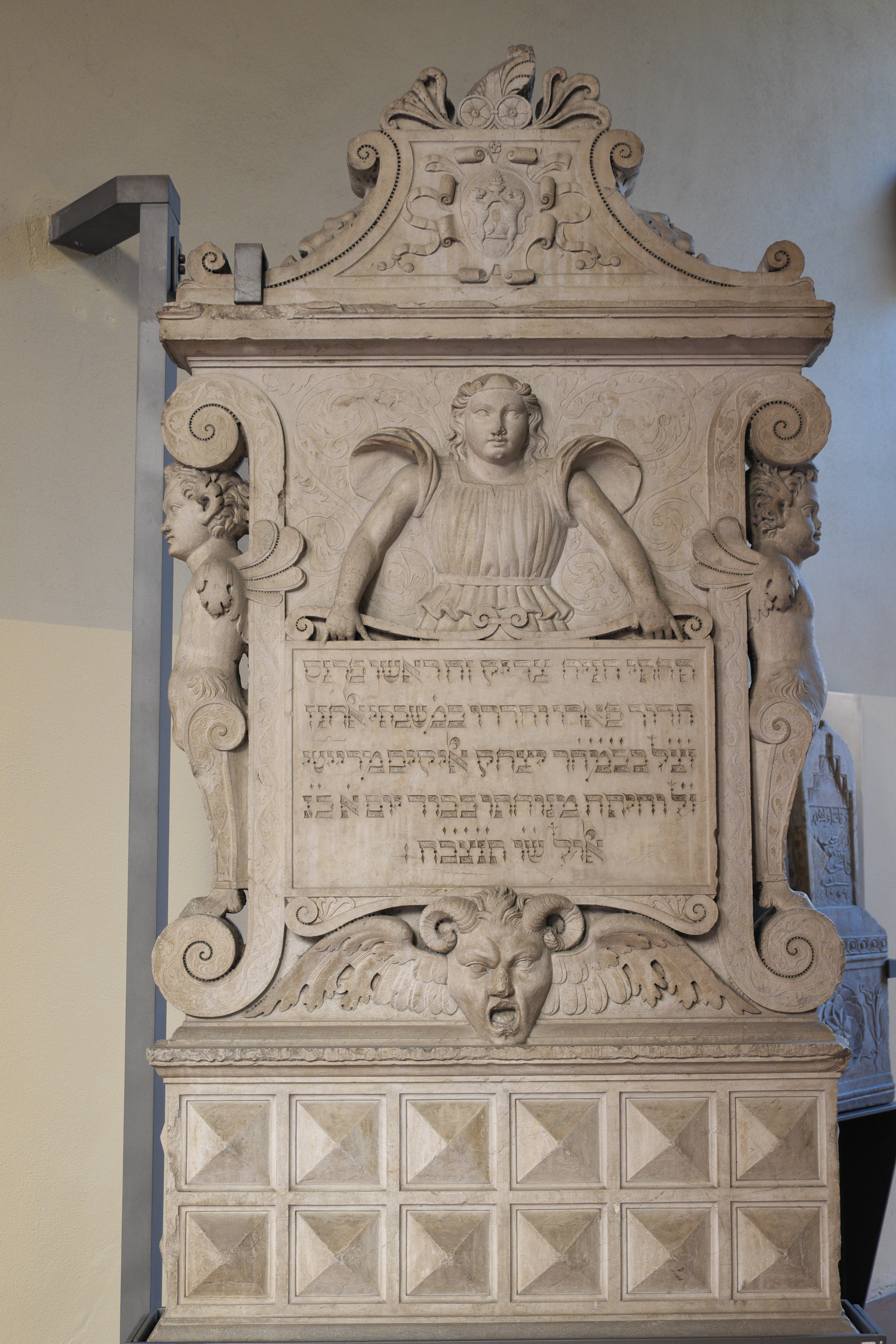 Grabstein für Shabbatai Elkanan da Rieti im Museo civico medievale in Bologna (Emilia-Romagna/Italien)